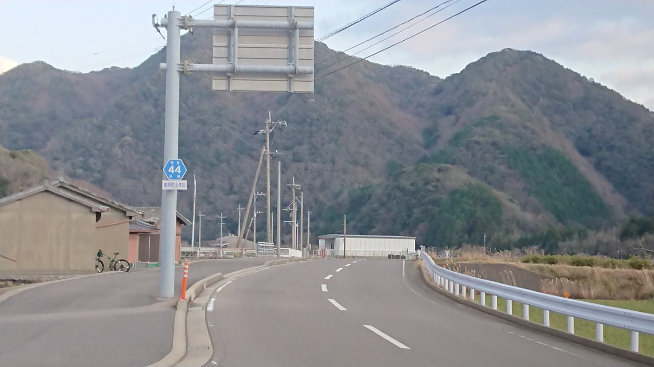 長崎県道44号桟原小茂田線 小茂田側 終点